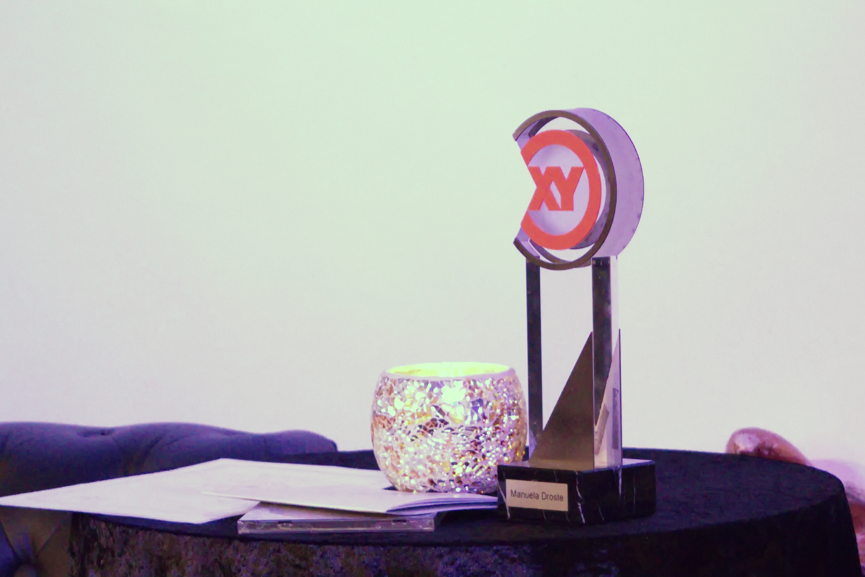 Wuppertal(k) am 2. Dezember 2015 im Kontakthof, Wuppertal mit Fabienne van Straten (KünstlerIn), Manuela Droste (ausgezeichnet mit dem XY Preis für Zivilcourage) und Kirk Whitmer (Modedesigner), Moderation: Michael Maus. Musikalischer Gast: Oliver Stein.